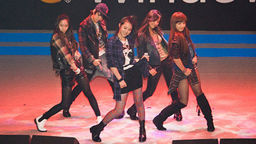 마이크로소프트 '윈도우 7' 런칭 블로거 파티